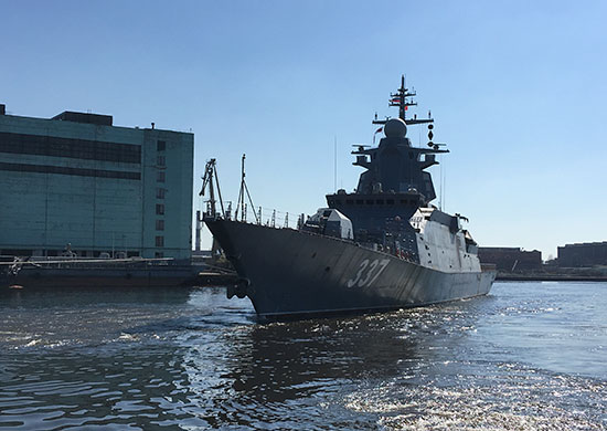 Российский корвет проекта 20385 «Гремящий» отходит от достроечной набережной предприятия «Северная верфь» (Санкт-Петербург)